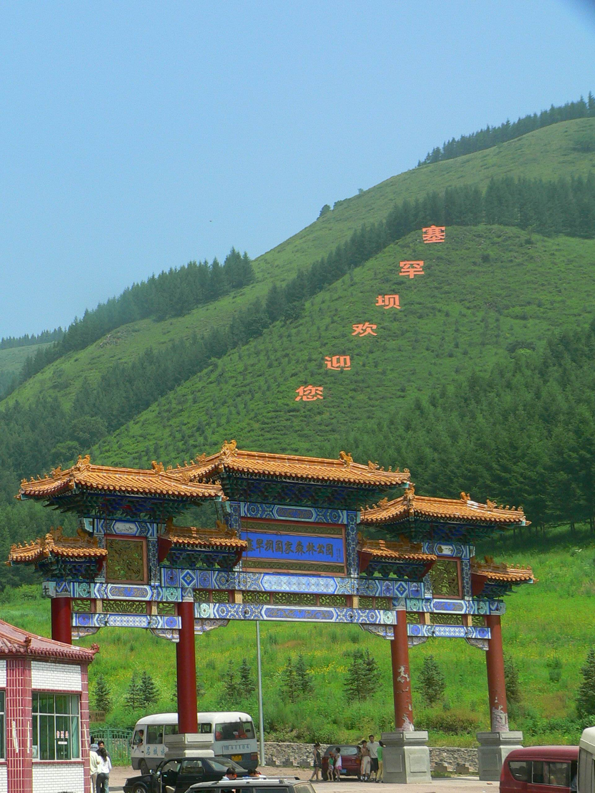 塞罕坝森林公园 拍摄